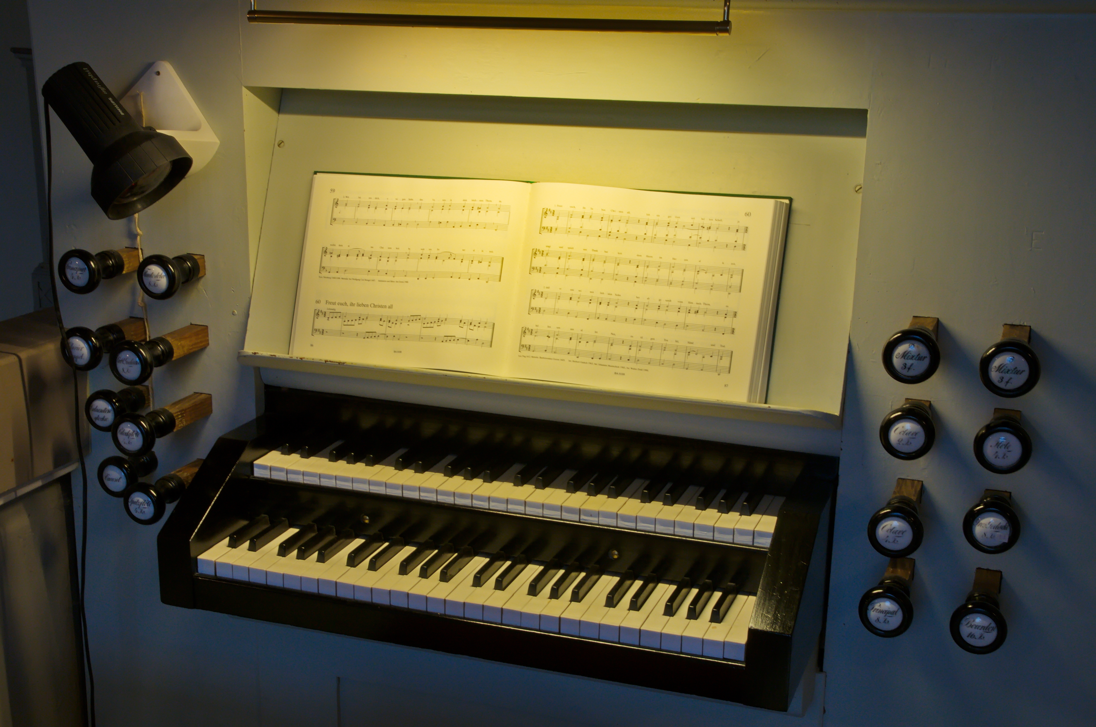 Spieltisch der Orgel der Dorfkirche in Blankenhagen